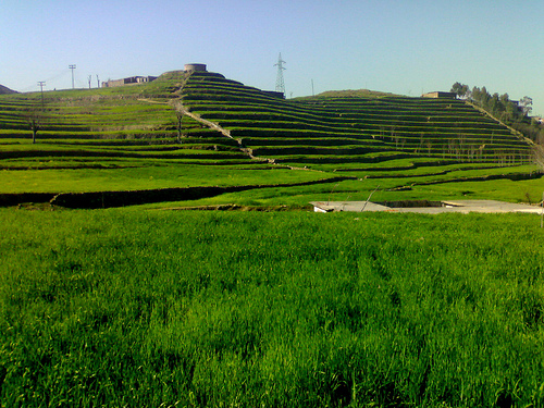 پښتو: Timergara pa jamee kay